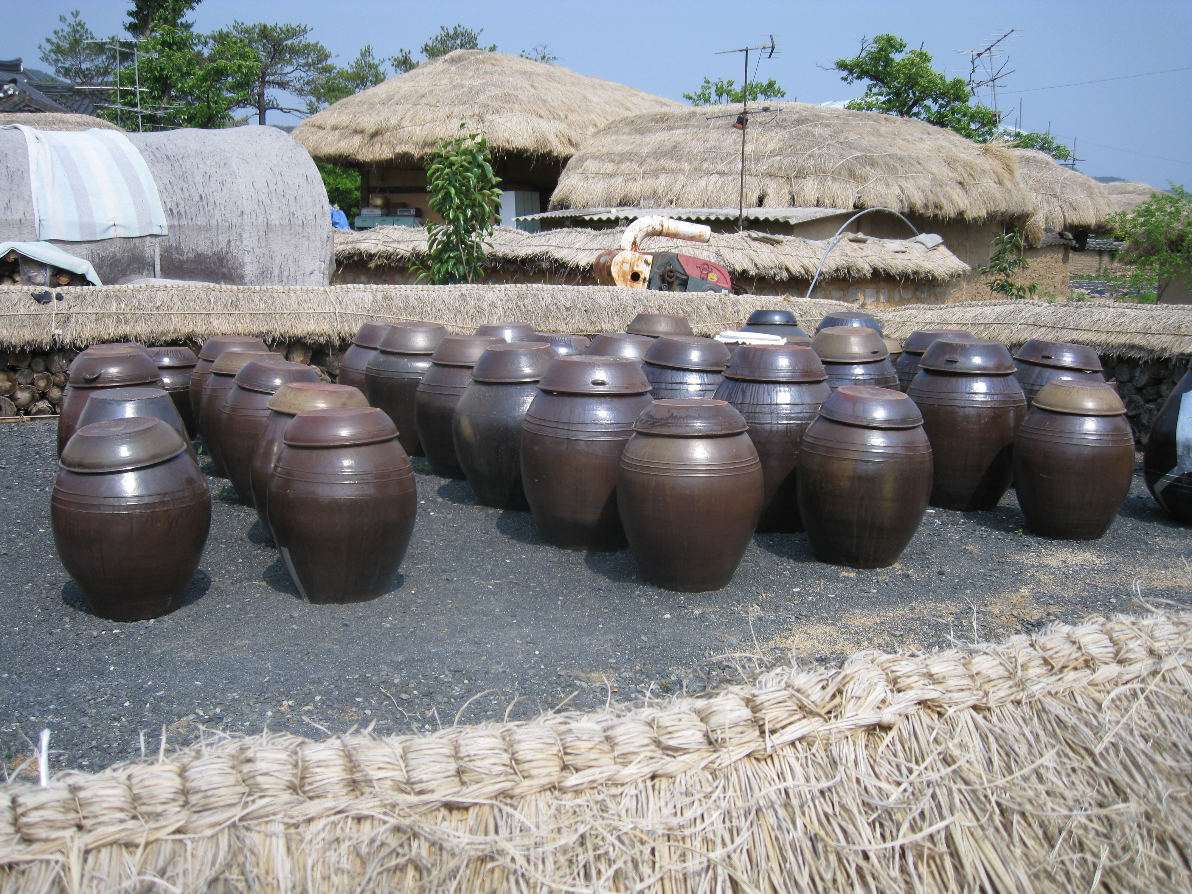 Korea-Andong-Hahoe Folk Village